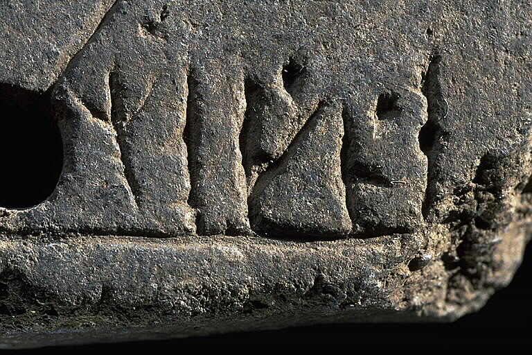 Vävtygnd från Vatnahverfi, Grönland. Inskriften består av mansnamnet Magne. Motiv: Kat nr 039 Vävtyngd av sten, från Danmark Nyckelord: Runor Kategori: Runristning/runsten Vävtygnd från Vatnahverfi, Grönland. Inskriften består av mansnamnet Magne.